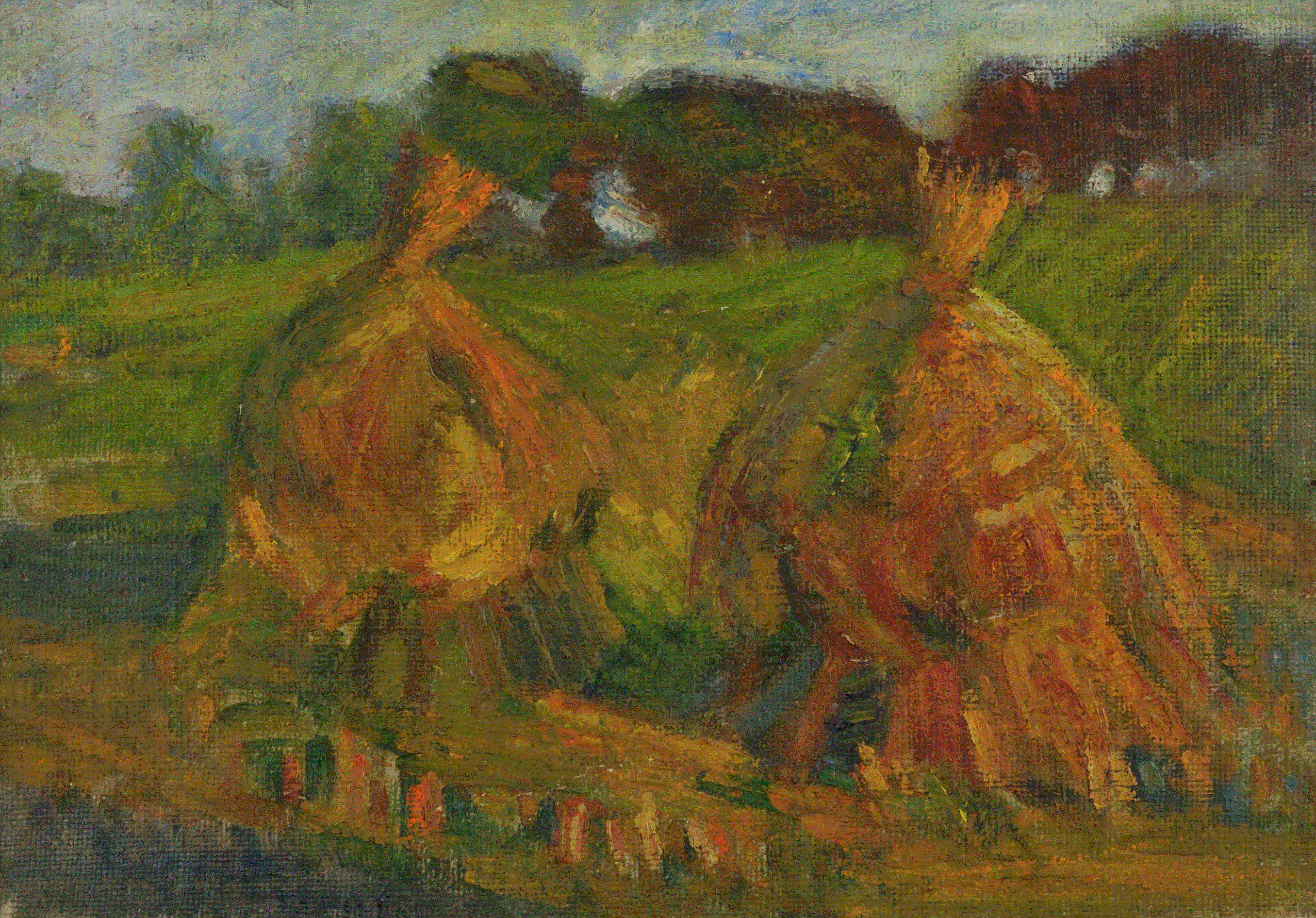 Kopki na polu 1940r